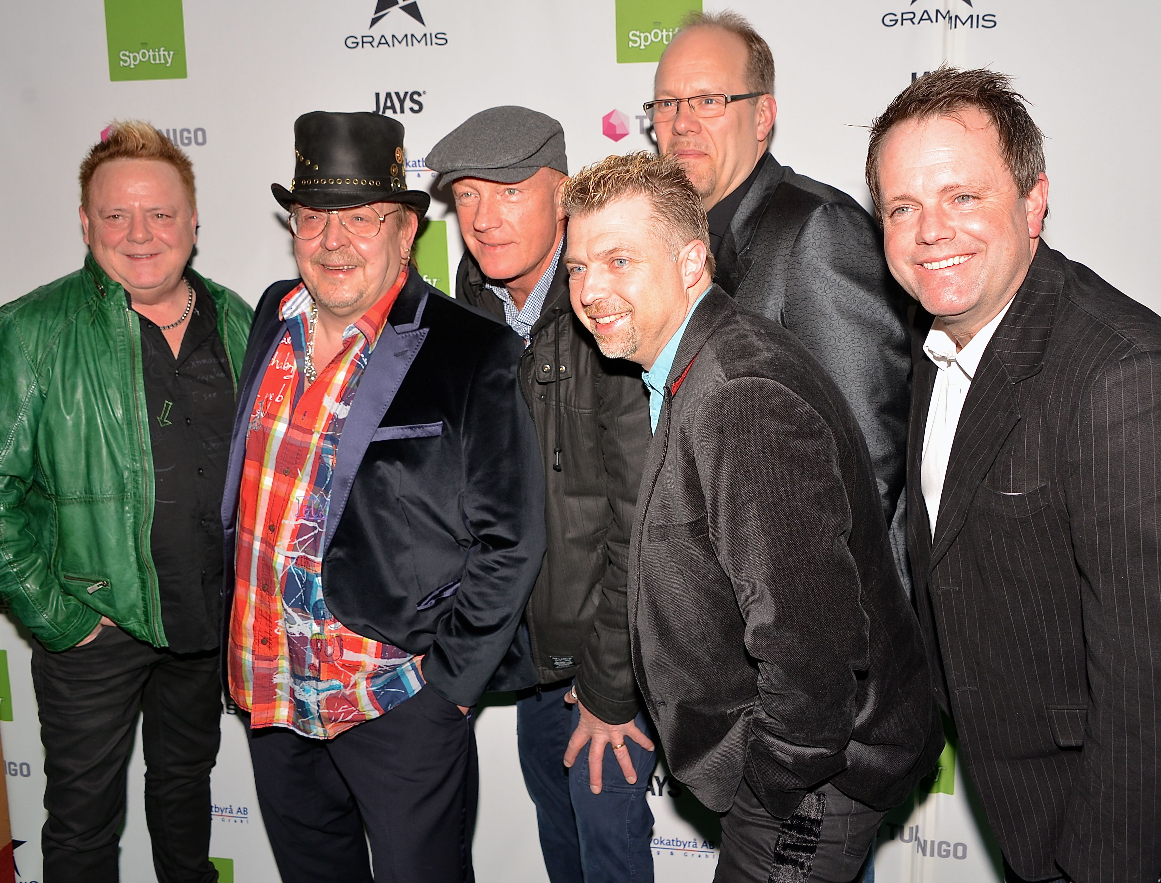 Lasse Stefanz på Grammisgalan på Cirkus, Stockholm den 20 februari 2013.